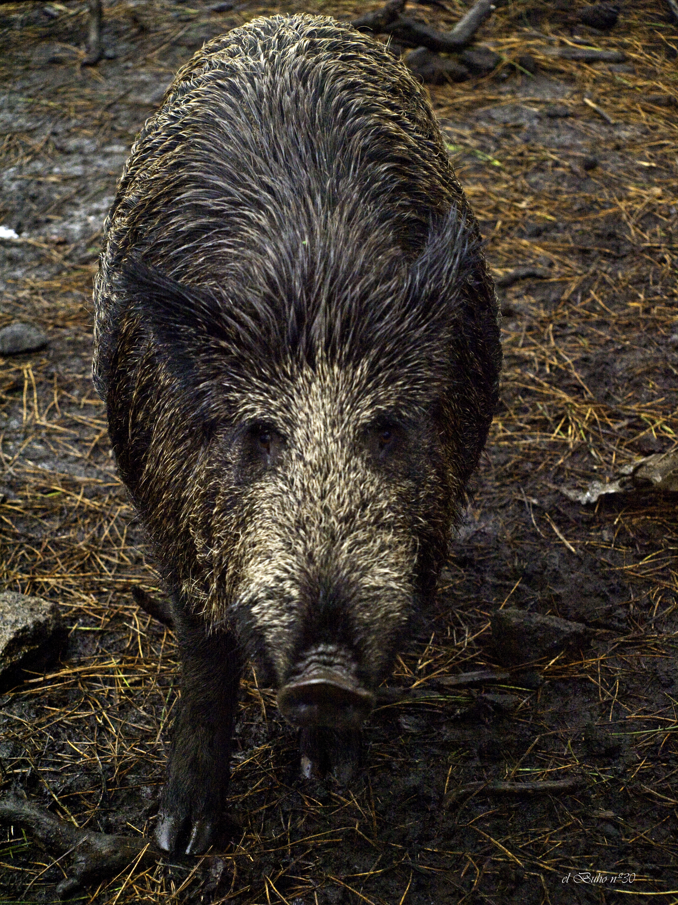 Jabalina